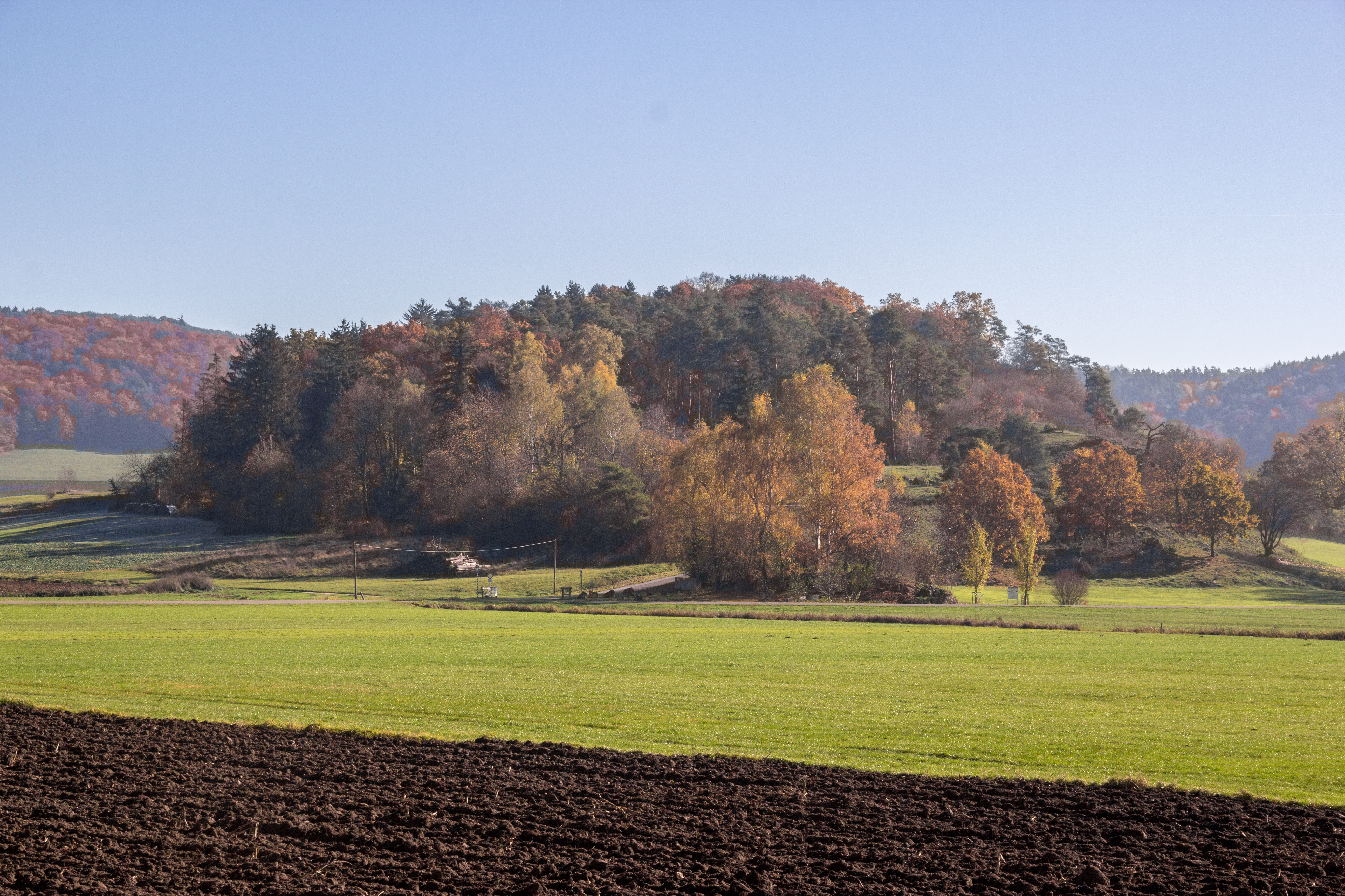 Galgenberg (Wellheim), Geotop, Umlaufberg der Urdonau